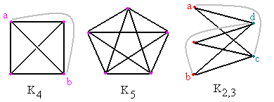 Creada por Romero Schmidtke, para la Enciclopedia Libre